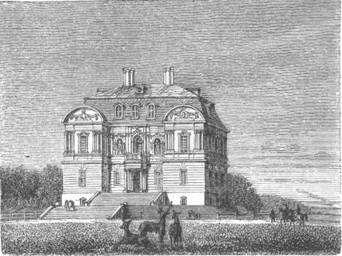 Eremitagen i Jægersborg Dyrehave. Opført 1736 som kongelig Jagtslot af Christian VI.